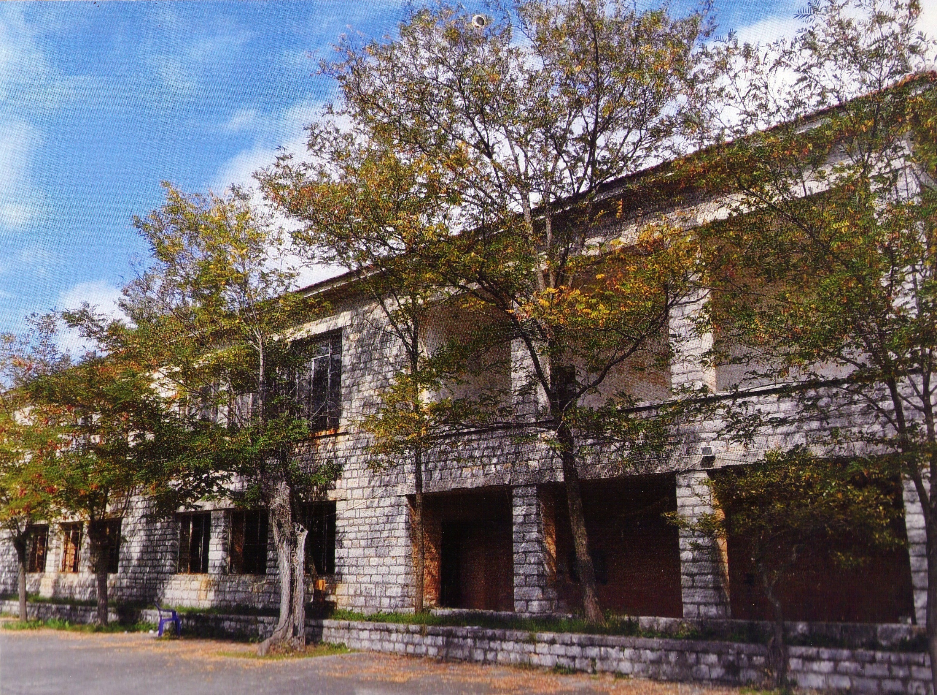 Σχολείο στον Ίσαρη Αρκαδίας